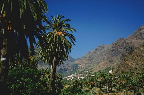 Palmeral en el barrio de Casa de La Seda, Valle Gran Rey, con Phoenix canariensis. Foto tomada por Pinzonazul.